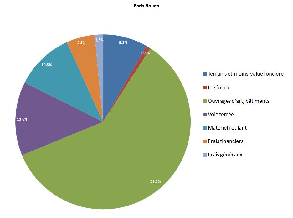 part de chaque dépense dans le total des dépenses des travaux du paris Roeun.